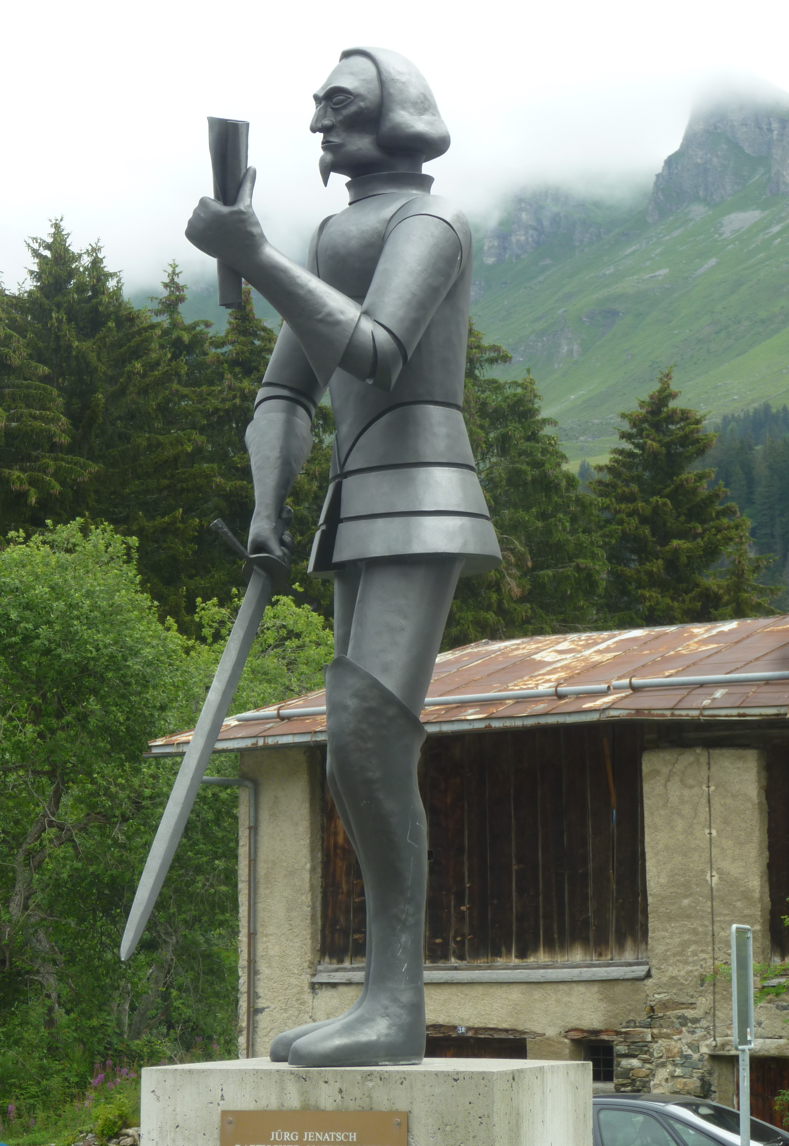 Georg Jenatsch, Denkmal von Roman Platz in Parpan, 2001